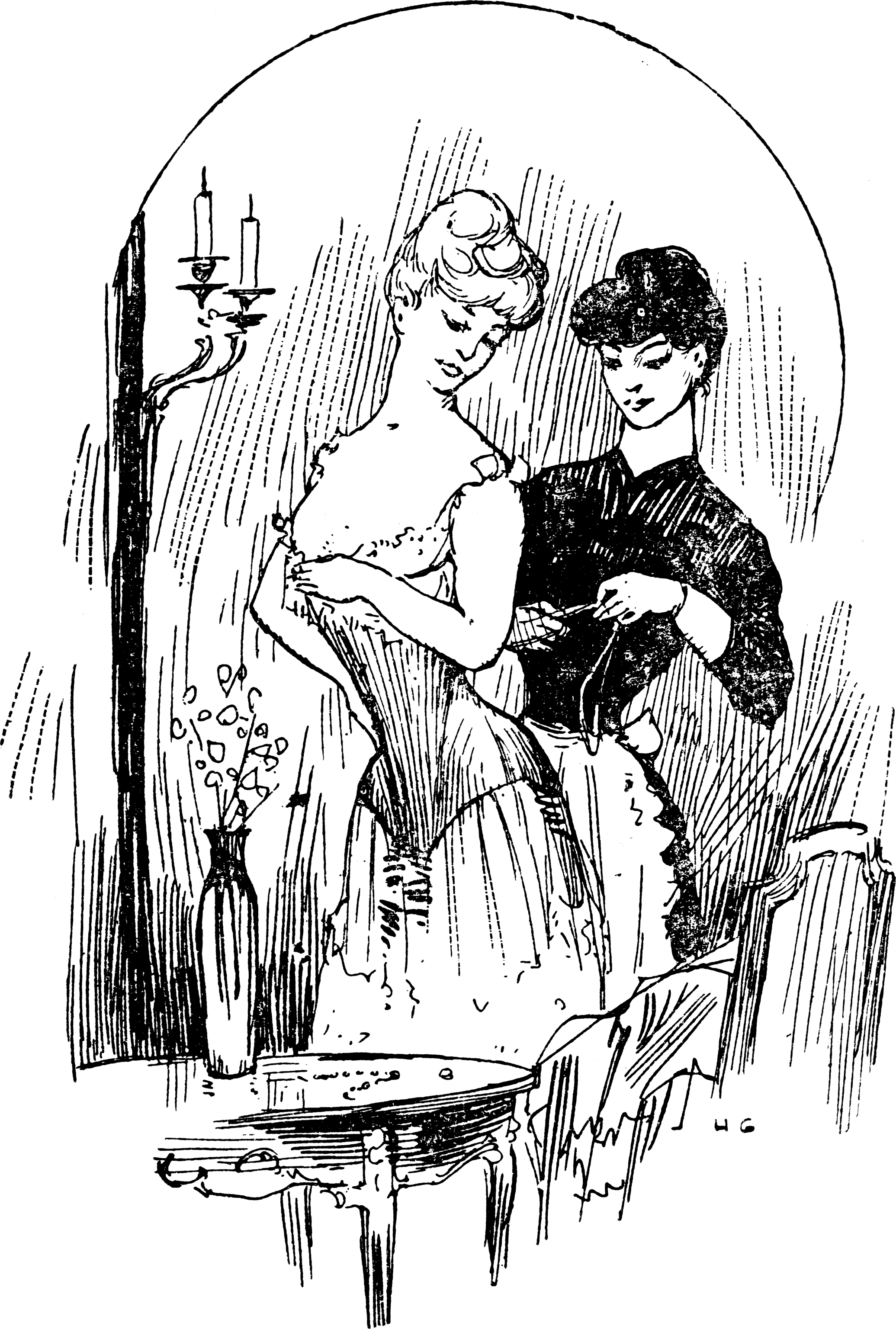 Il soutient les faibles et contient les forts.